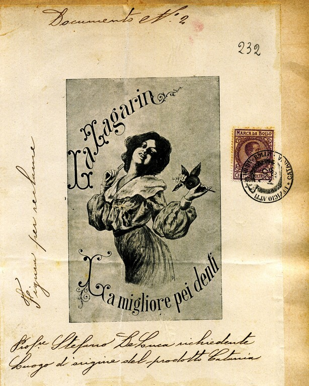 Marchio di fabbrica del dentifricio La Zagarin. La migliore pei denti, prodotto da Stefano De Luca, raffigurante una donna con un'arancia adorna di foglie e zagare nella mano sinistra e uno spazzolino da denti nella mano destra (AS Catania, Prefettura di Catania, I, el. 42, b. 33/508 , fasc. 4, c. 232r., 1908)